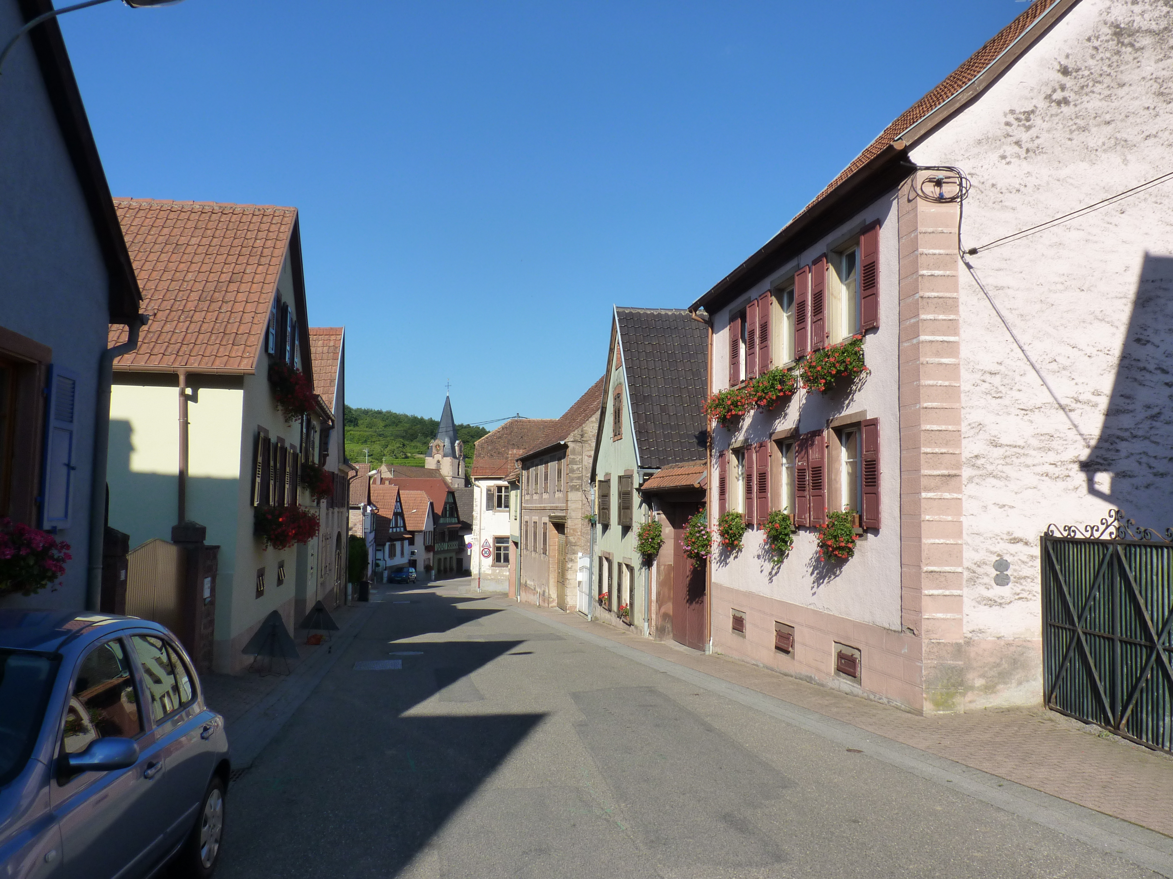 Rue principale de Rosenwiller